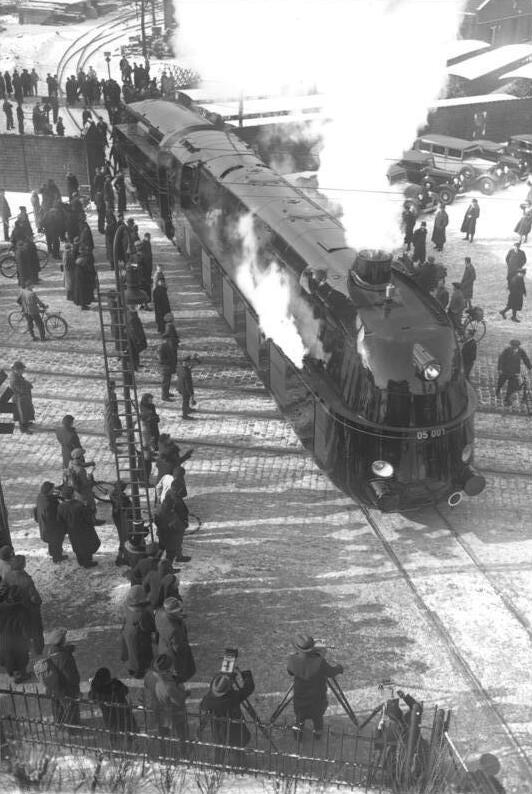 Die schnellste Stromlinienlokomotive der Welt wurde in den Borsigwerken in Berlin-Tegel für die Deutsche Reichsbahn fertiggestellt. Die Maschine hat eine Leistung von 2300 PS bei 175 Stundenkilometern. Die neue deutsche Stromlinienlokomotive, die schnellste der Welt, verläßt das Borsigwerk in Berlin-Tegel zu seiner ersten Probefahrt.